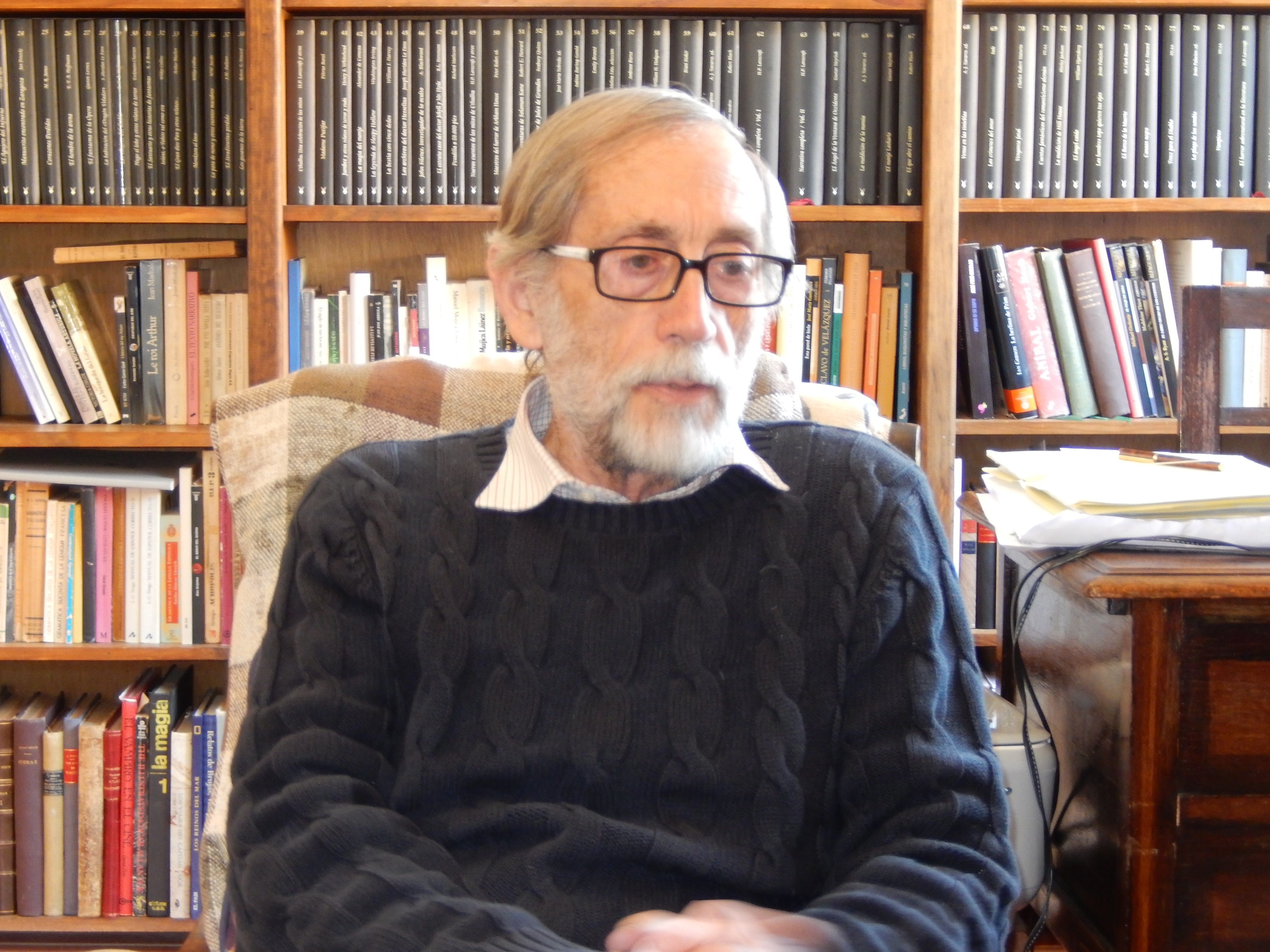 Francisco Torres Oliver